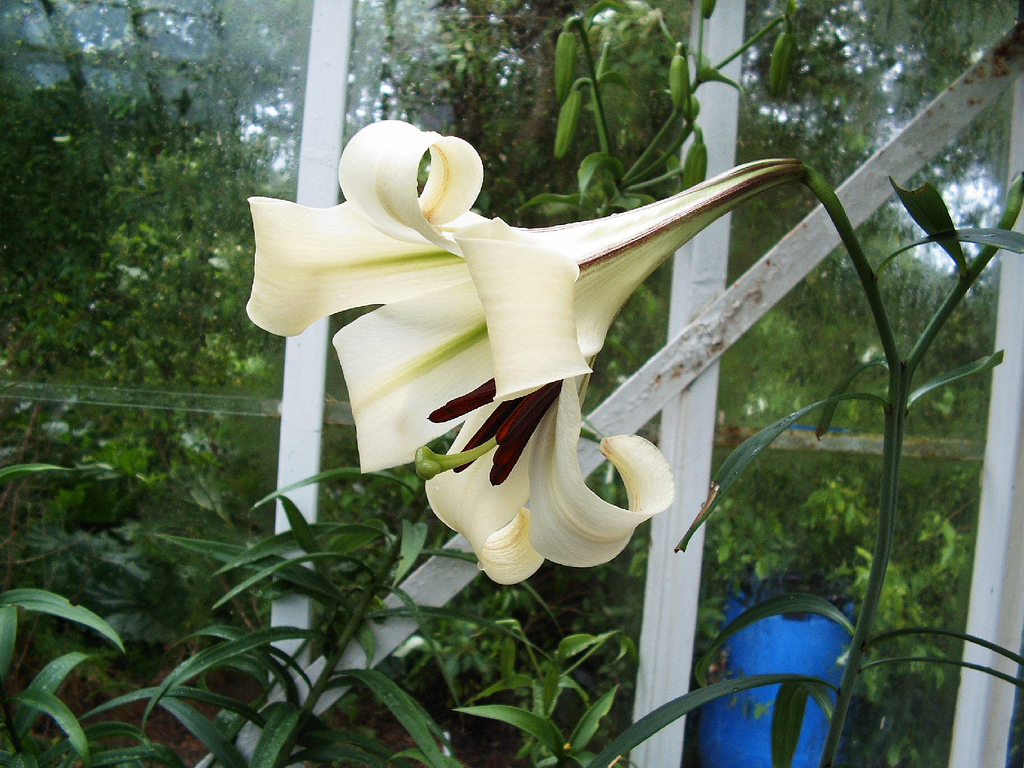 Lilium brownii